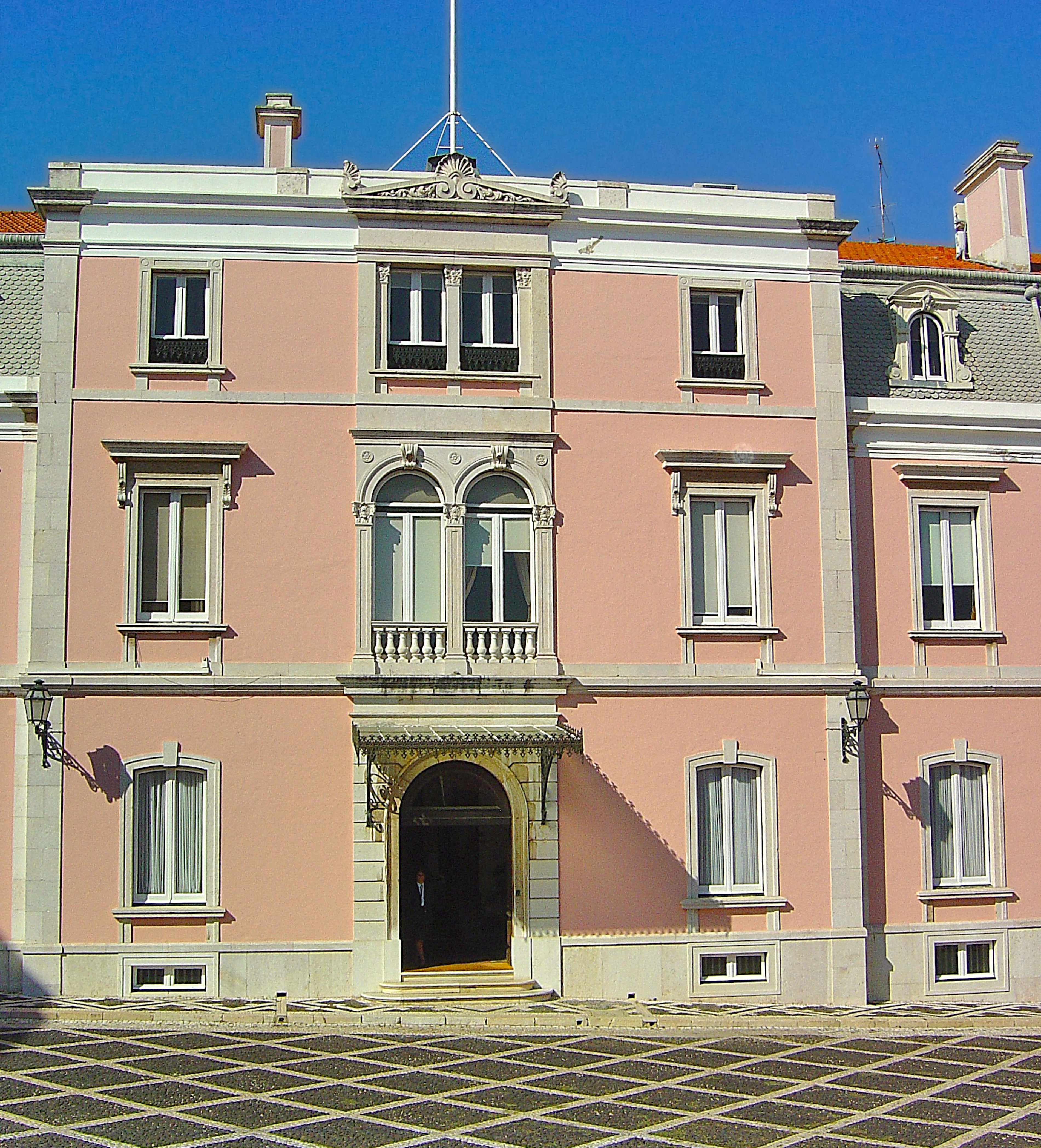 O Palácio, localizado em Belém, outrora palácio de reis, é hoje monumento nacional e sede da Presidência da República Portuguesa. Chamado "das leoneiras" no século XVIII, parece ter como emblema o leão - símbolo solar que alia a Sabedoria ao Poder. Uma bandeira de cor verde com o escudo nacional - o estandarte presidencial - é hasteada no palácio indicando a presença do Presidente em Belém. Trata-se de um conjunto arquitectónico e paisagístico onde avulta um edifício central de cinco corpos com frente para o rio Tejo. A um primeiro palacete, para nascente do Pátio das Damas - o Anexo - segue-se, na viragem para a Calçada da Ajuda, outra construção - o Picadeiro Real, hoje Museu dos Coches. Para poente desenvolvem-se os conjuntos do Pátio dos Bichos, do pavilhão da Arrábida e do Jardim da Cascata. Na direcção do sul estende-se o Jardim Grande, que termina num mirante cujo gradeamento prolongado para nascente e poente encontra dois pequenos pavilhões, outrora designados "casas de recreação".